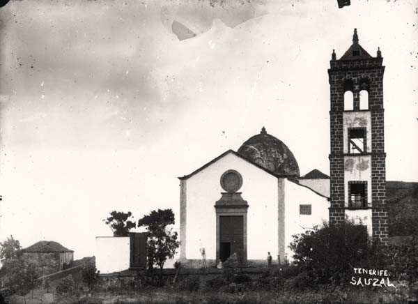 Iglesia de San Pedro Apóstol (El Sauzal) 1890-1895